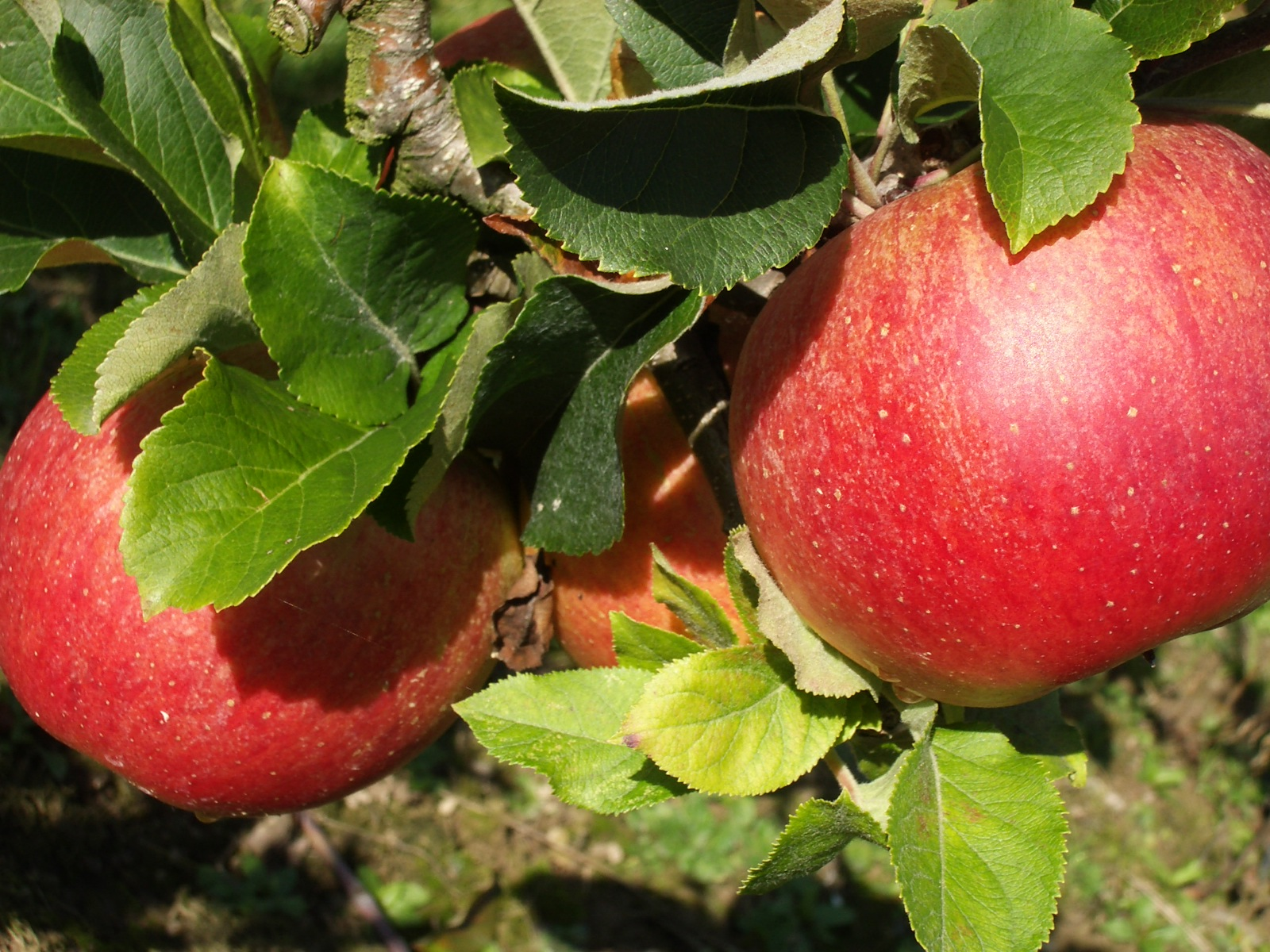 Malus Lord Lambourne, Münzlishausen AG self-made, October 2005